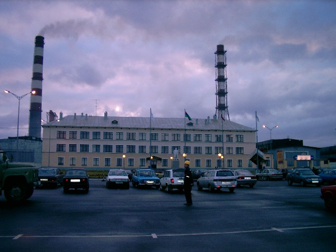 Заводоуправление Надвоицкого алюминиевого завода